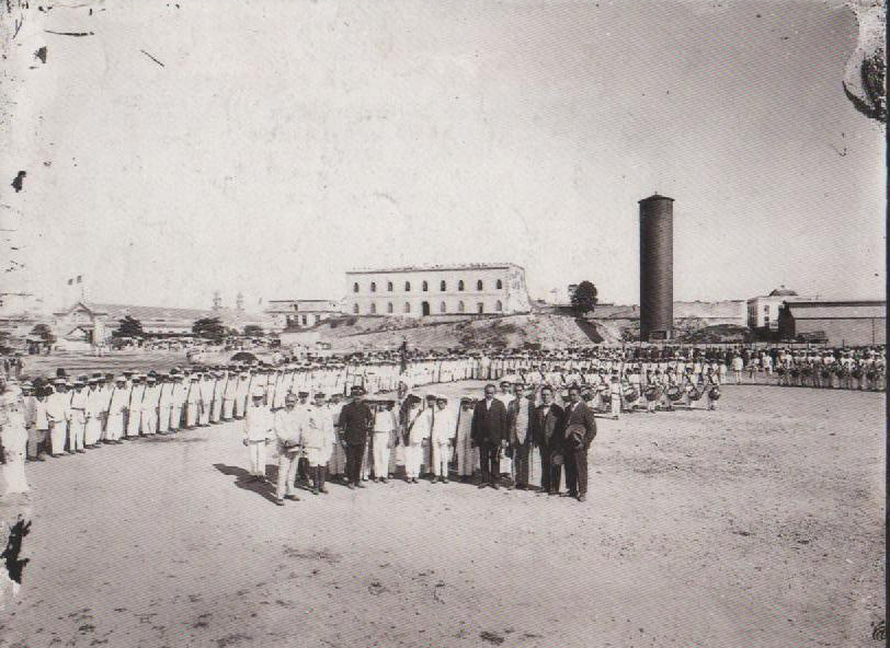 Fotografía de la Explanada de la Antigua Ciudadela de San Benito en el siglo XIX.